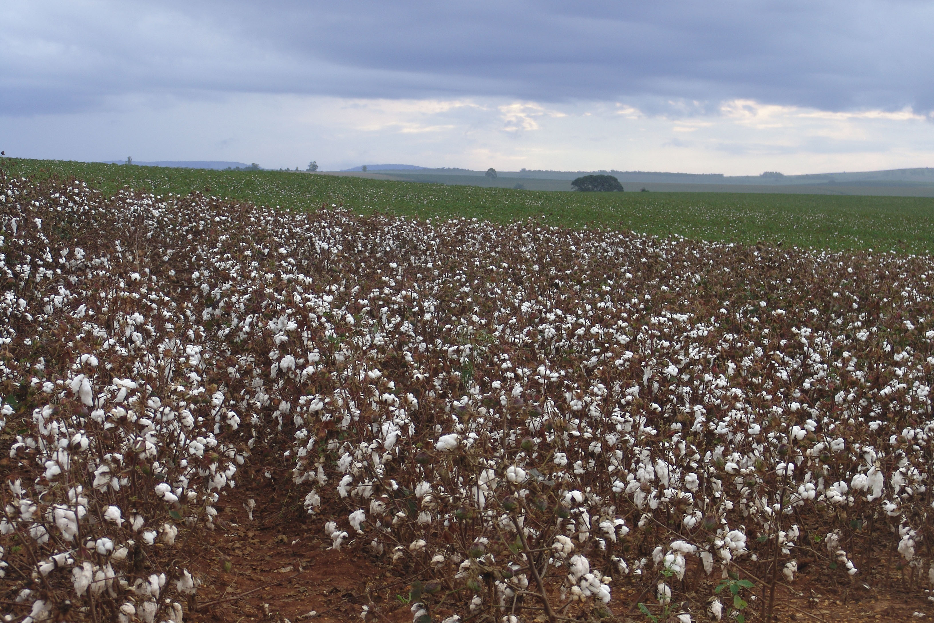 Plantação de algodão, Avaré, São Paulo, Brasil